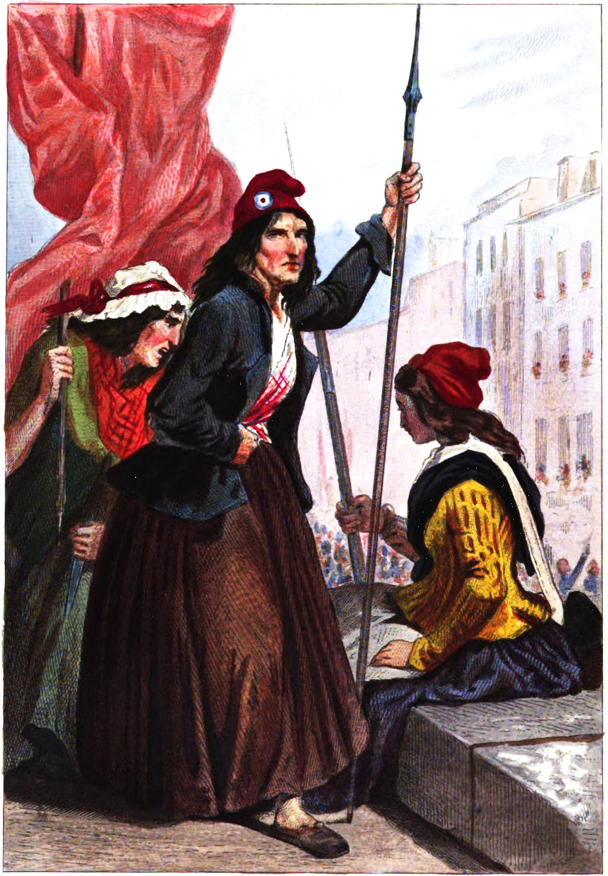 Les tricoteuses de la guillotine sur les marches de l'église Saint-Roch le jour de l'exécution de Marie-Antoinette, 16 octobre 1793. Gravure sur acier, eau forte coloriée de Léopold Massard d'après un dessin d'Henri Baron, 1843.